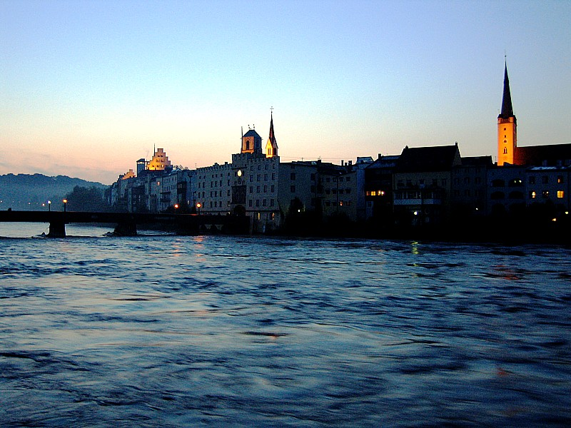 Wasserburg am Inn - Bayern - Deutschland